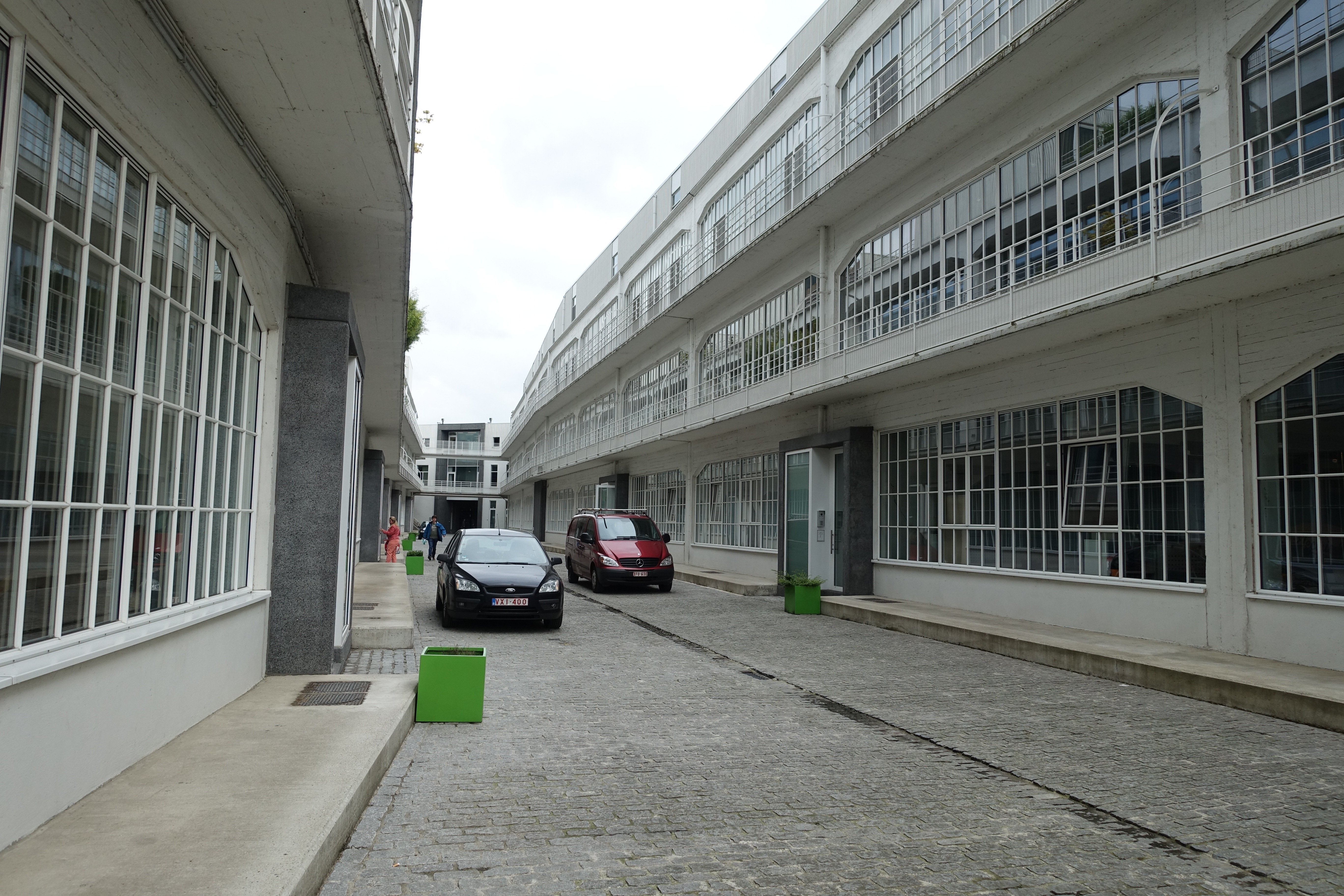 Gebouwen van Woestijnvis en Humo in Vilvoorde, gelegen tussen de Harensesteenweg en de Zenne.